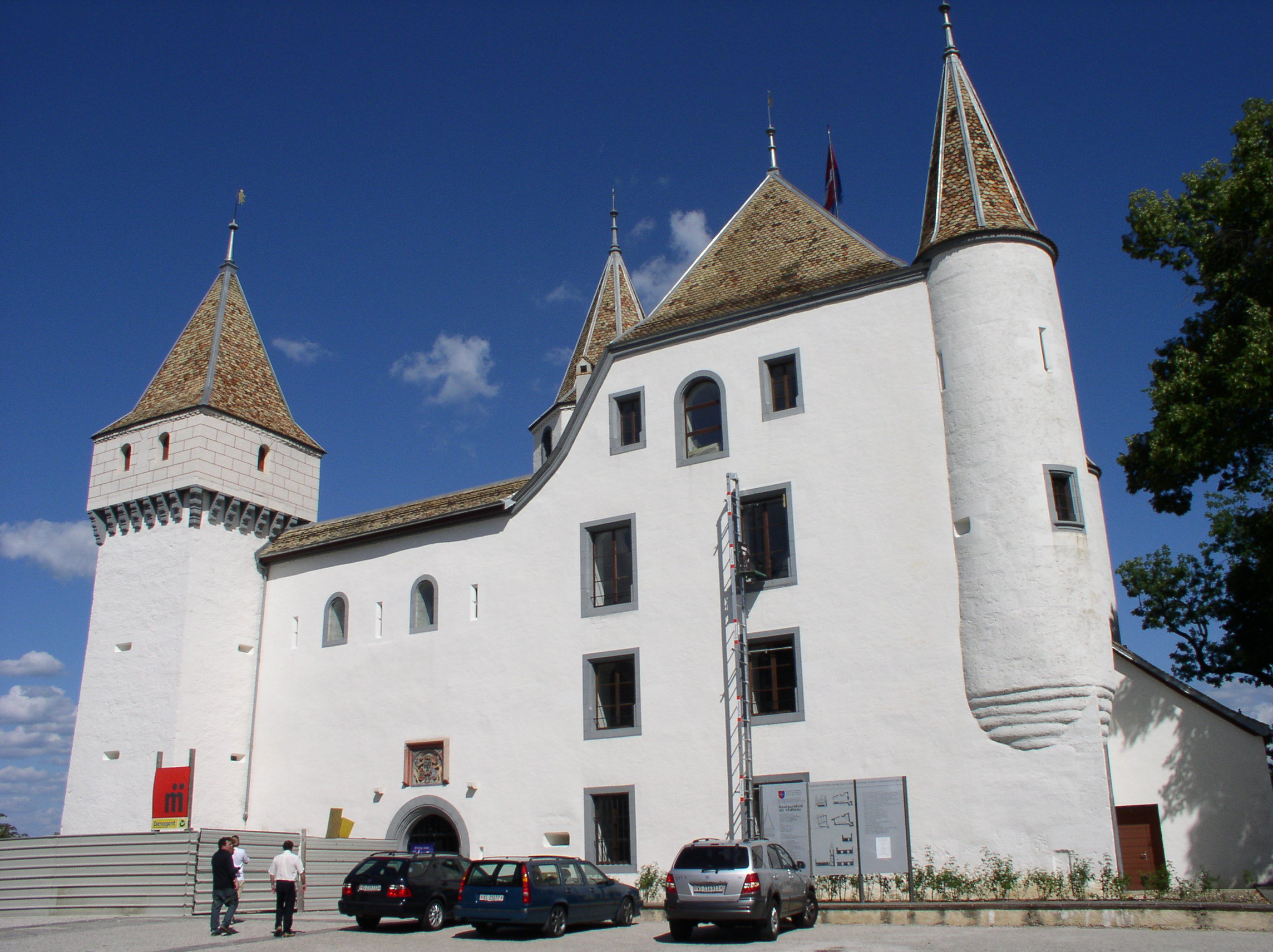 Castello di Nyon VD, Svizzera